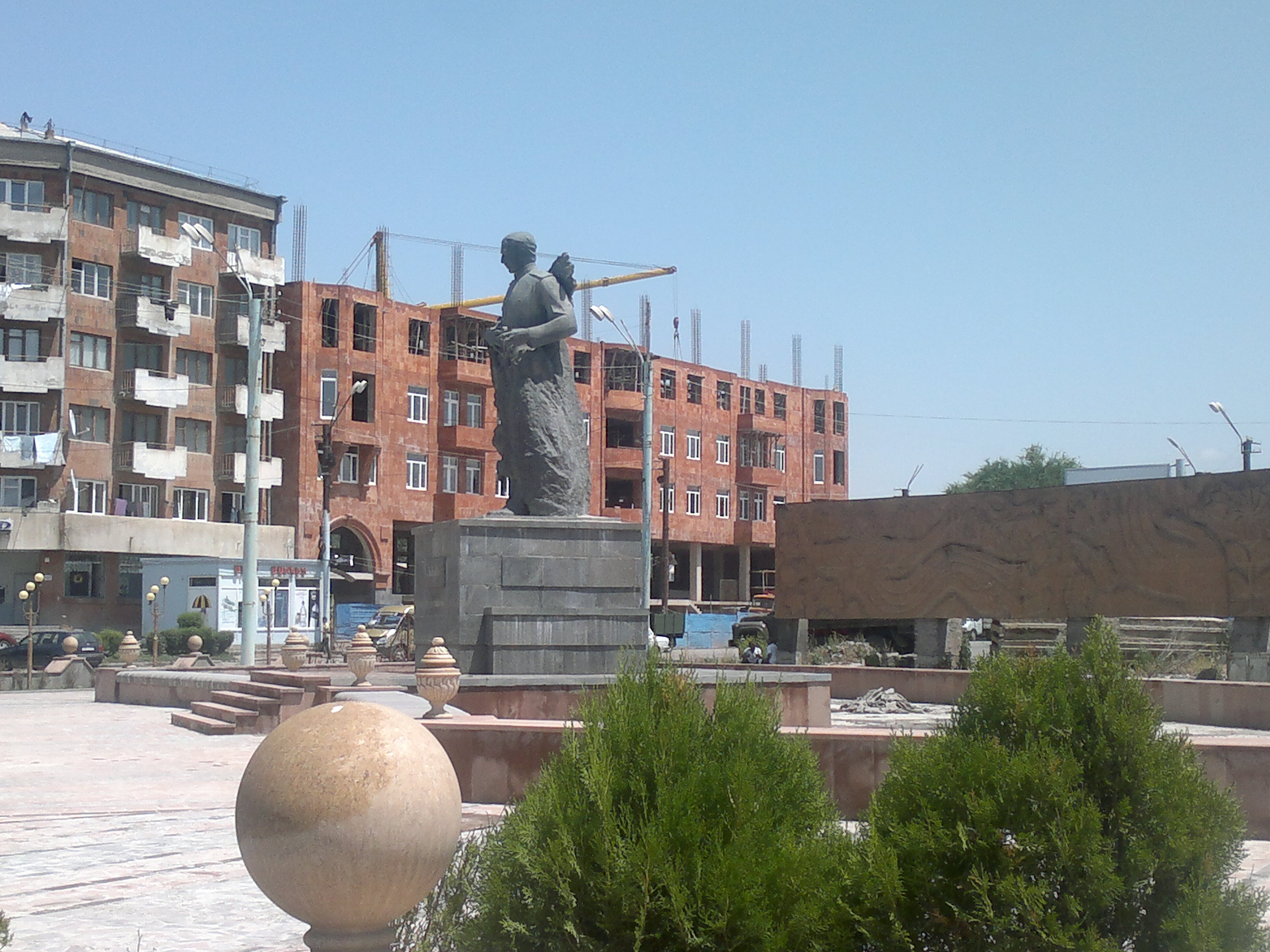 Գարեգին Նժդեհի հուշարձանը Գյումրիում 1/4.887